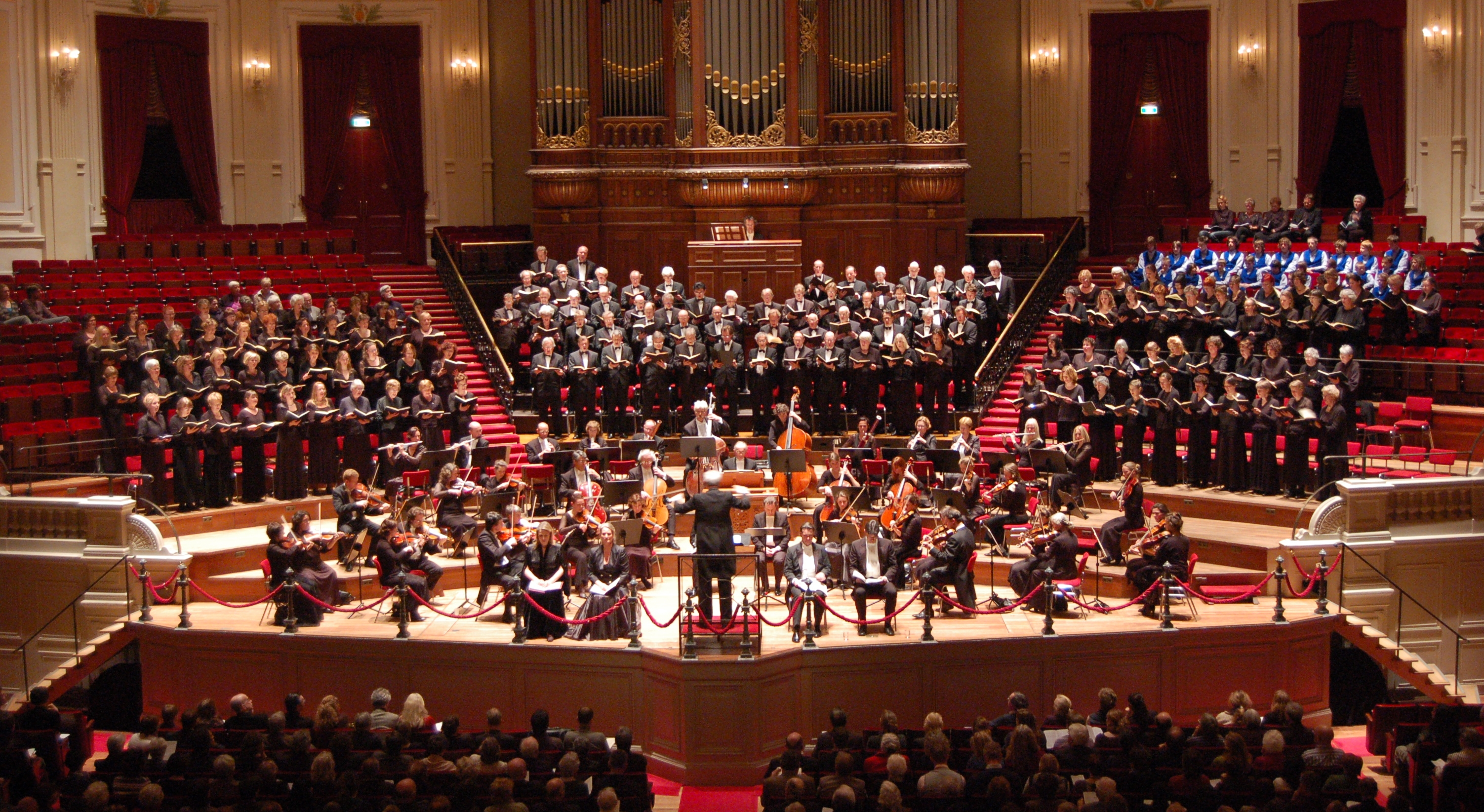 KCOV Excelsior tijdens de uitvoering van de Matthäus-Passion op 18 maart 2008 in het Concertgebouw te Amsterdam